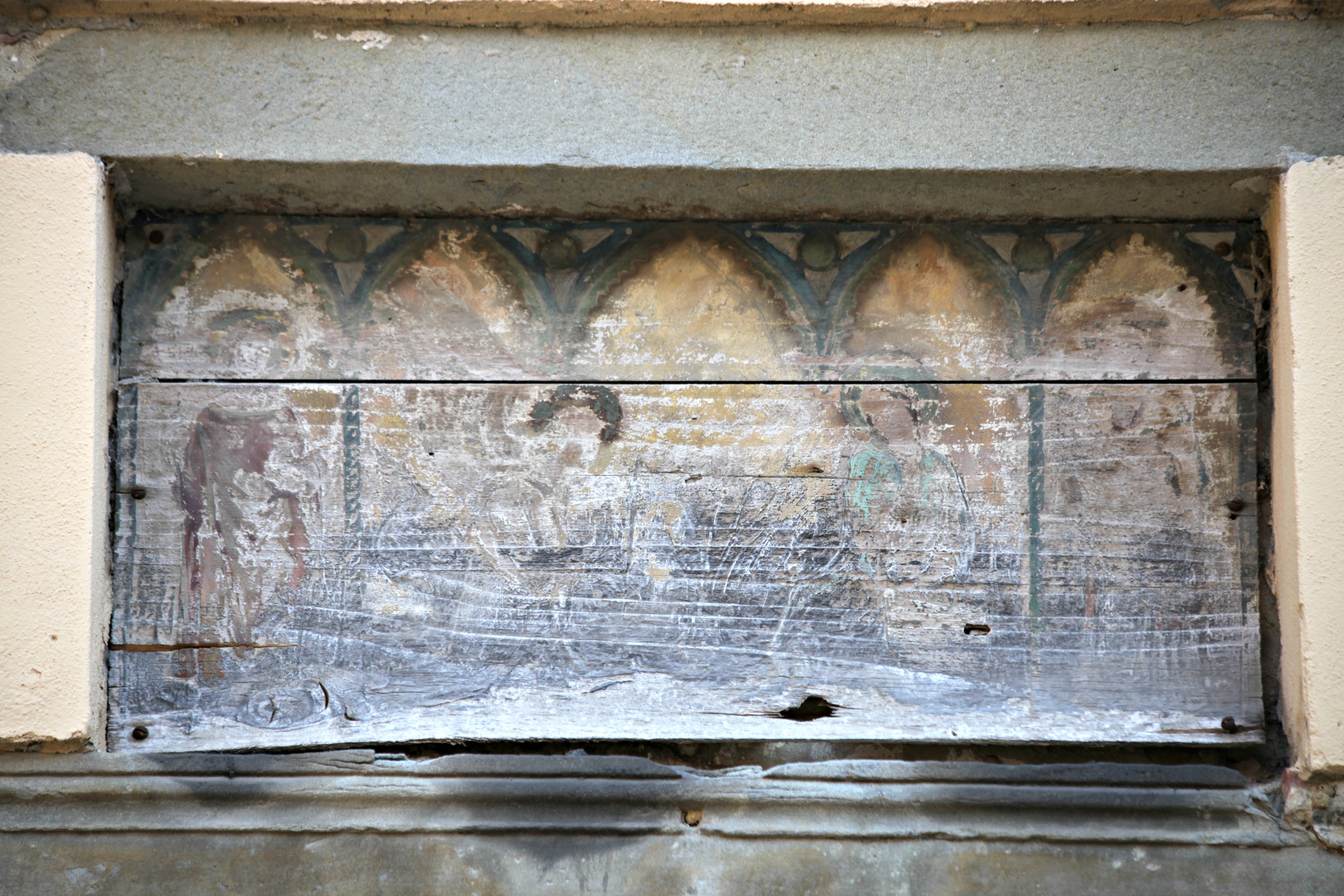 Annunciazione, Palazzo del Vescovo e del Podestà (Montopoli in Val d'Arno) (2)